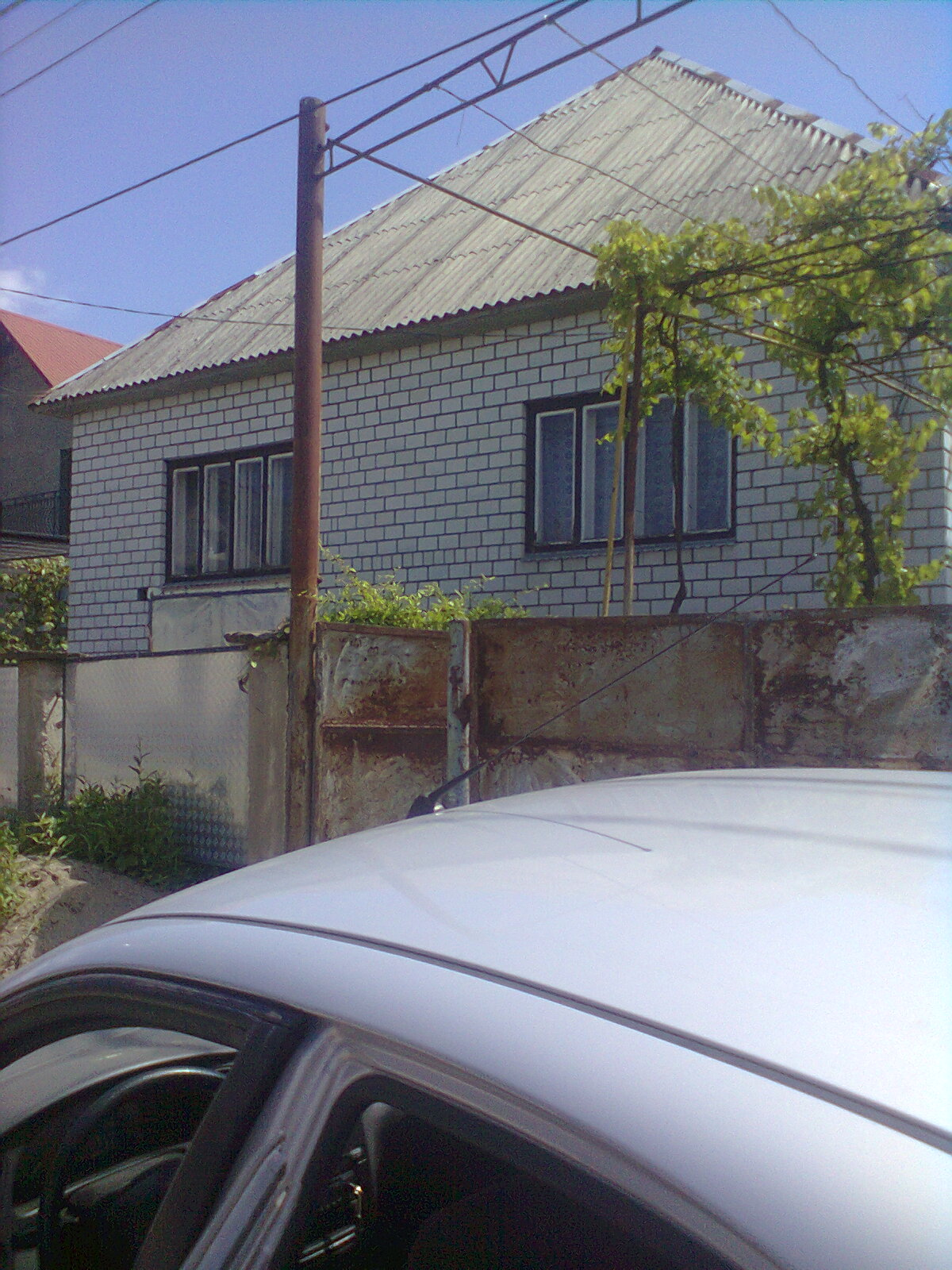 Кушниця вул.Пушкіна Мала Сторонка (Заріка)